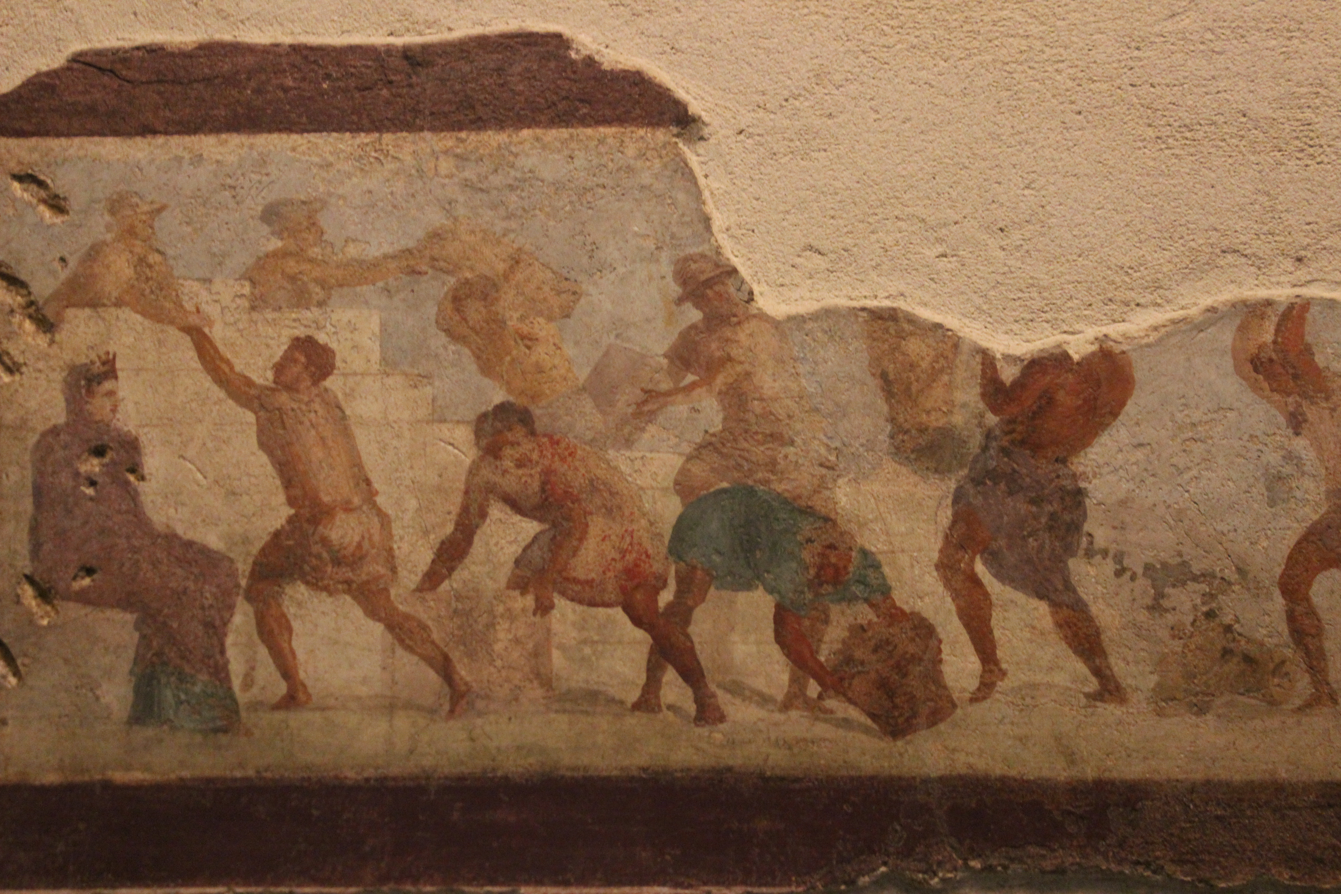 Palazzo Massimo alle Terme. Frescos del Colombario del Esquilino.